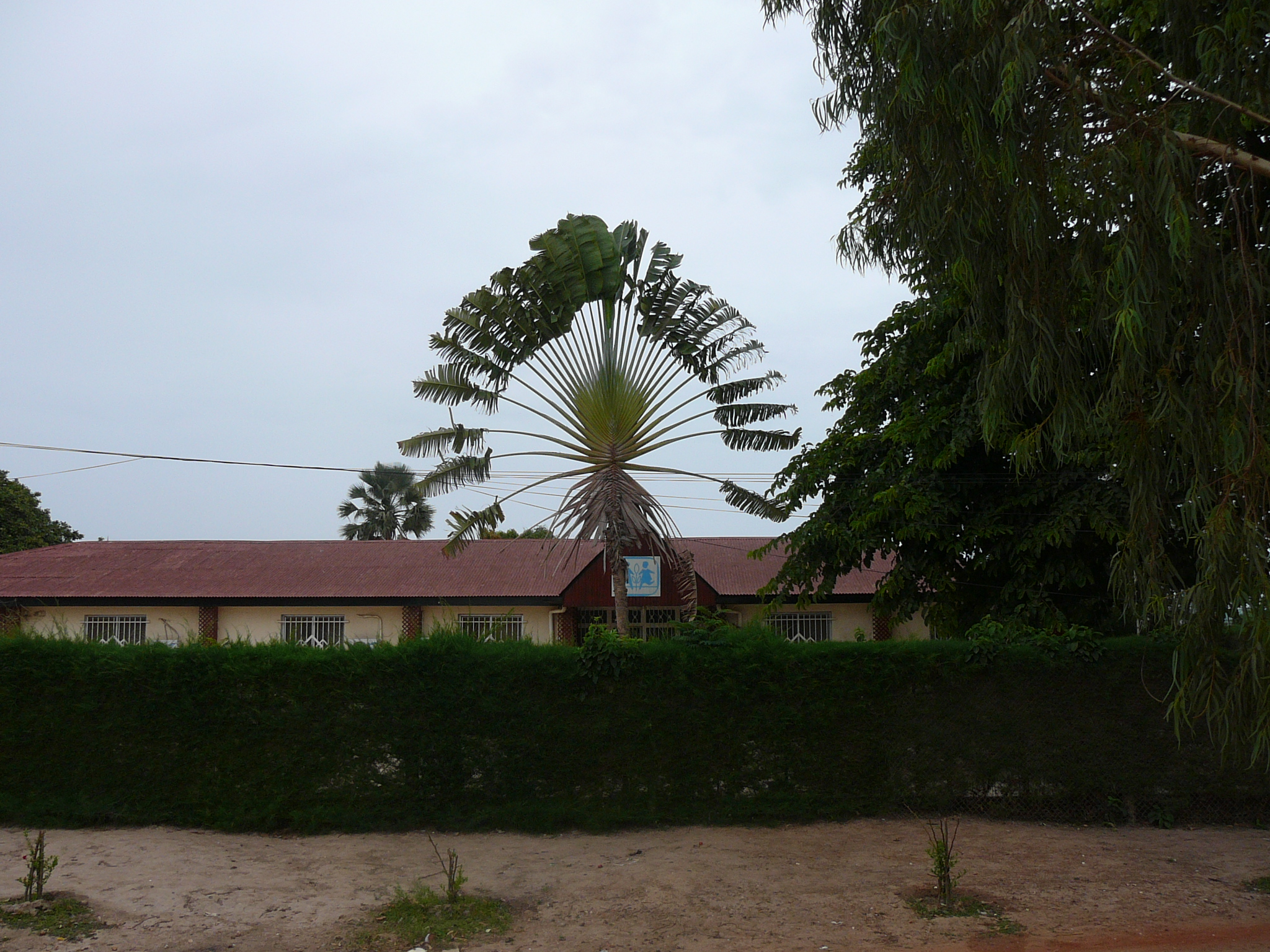 SOS-Kinderdorf, Serekunda, Gambia